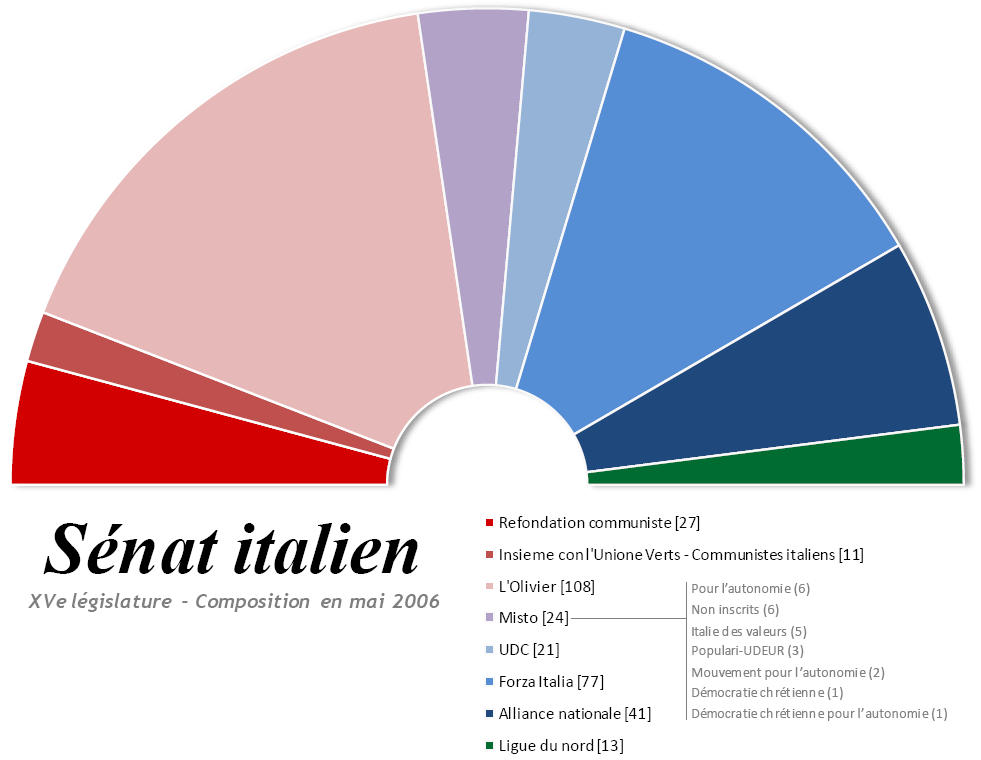 Composition du Sénat italien, XVe législature, mars 2006, répartition des sénateurs par groupes.